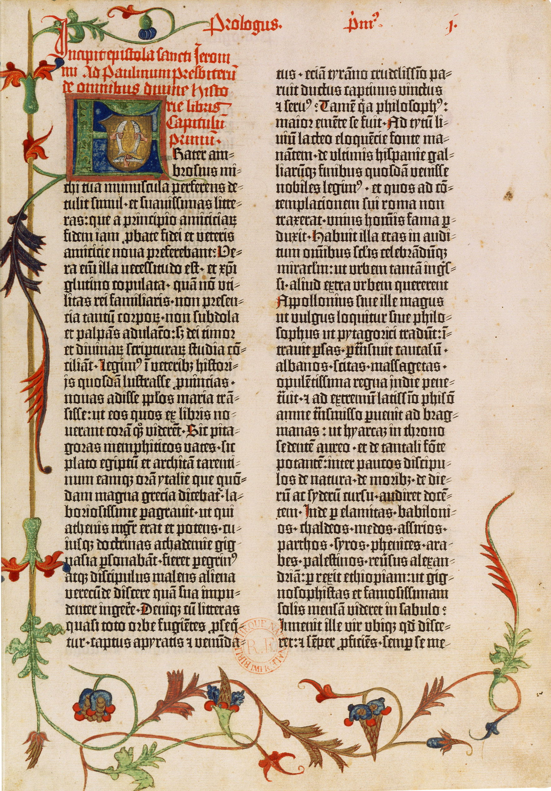 Page de la bible de Bamberg.